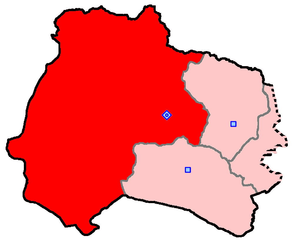 حوزهٔ انتخاباتی بجنورد، راز و جرگلان، مانه و سملقان و جاجرم برای انتخابات مجلس شورای اسلامی